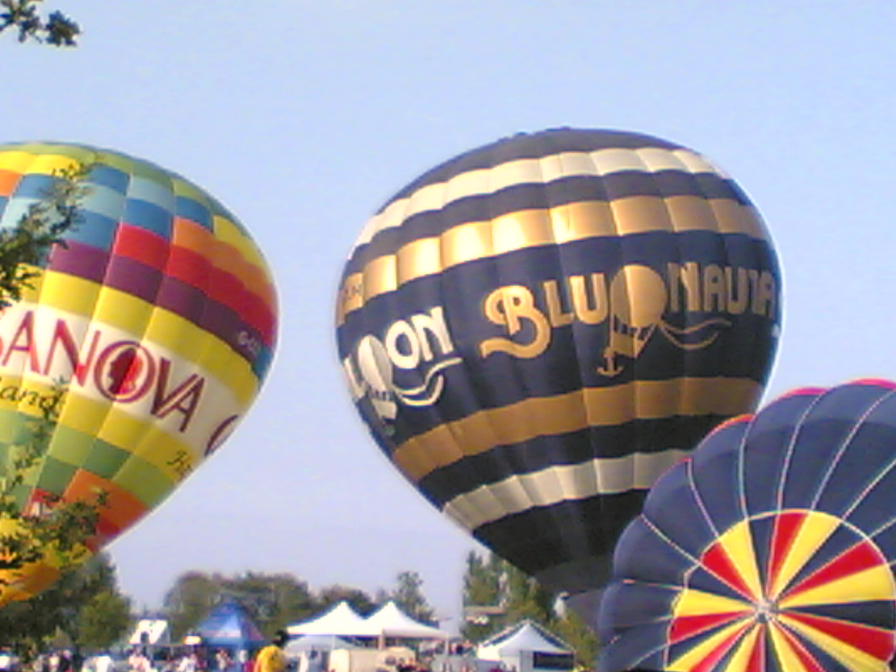 Mongolfiere del Ferrara Balloons Festival 2006